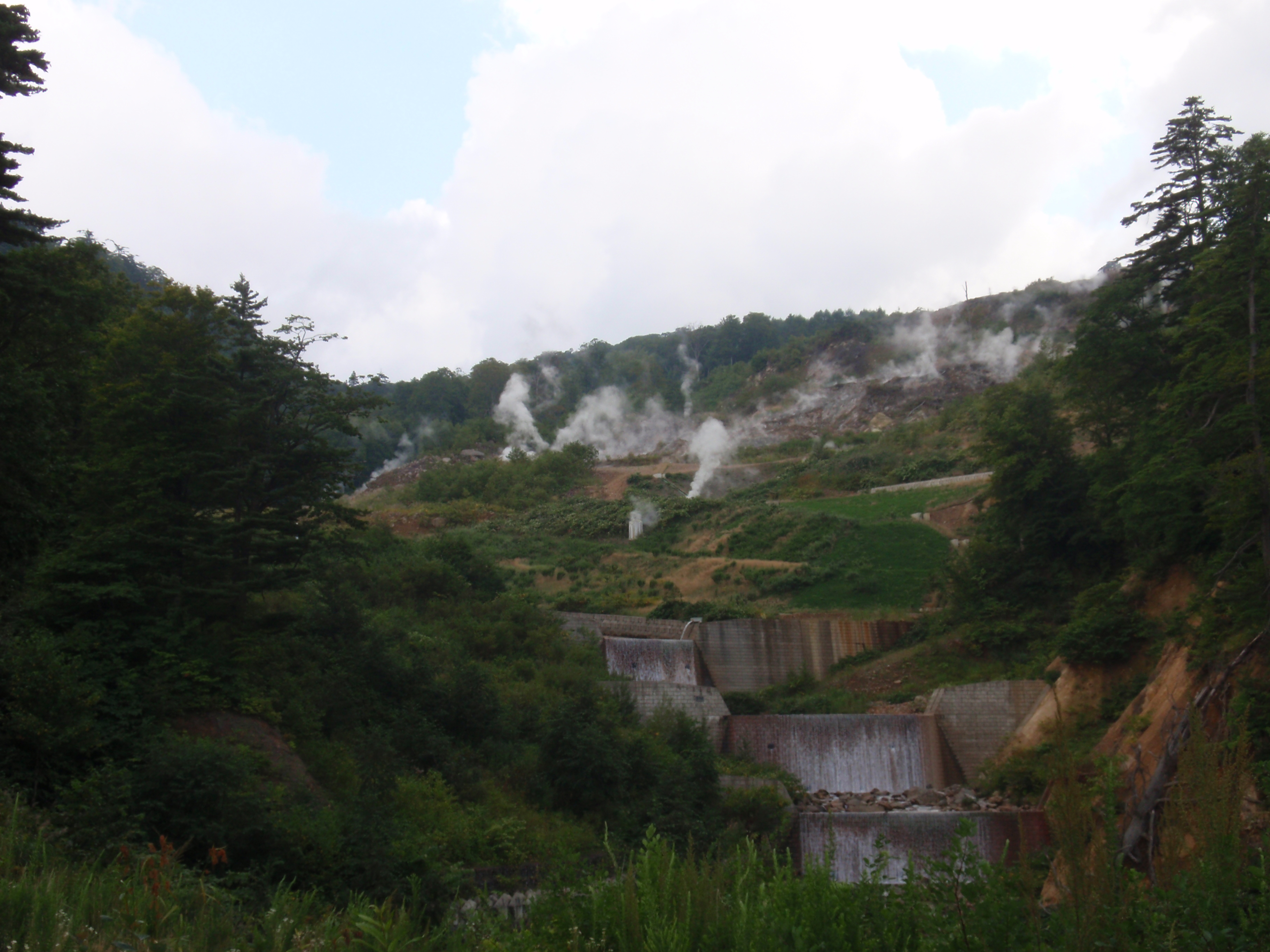 澄川温泉跡地